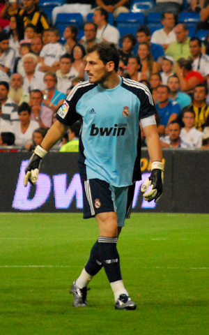 Trofeo Santiago Bernabeu 2010 Real Madrid 2 - Peñarol 0